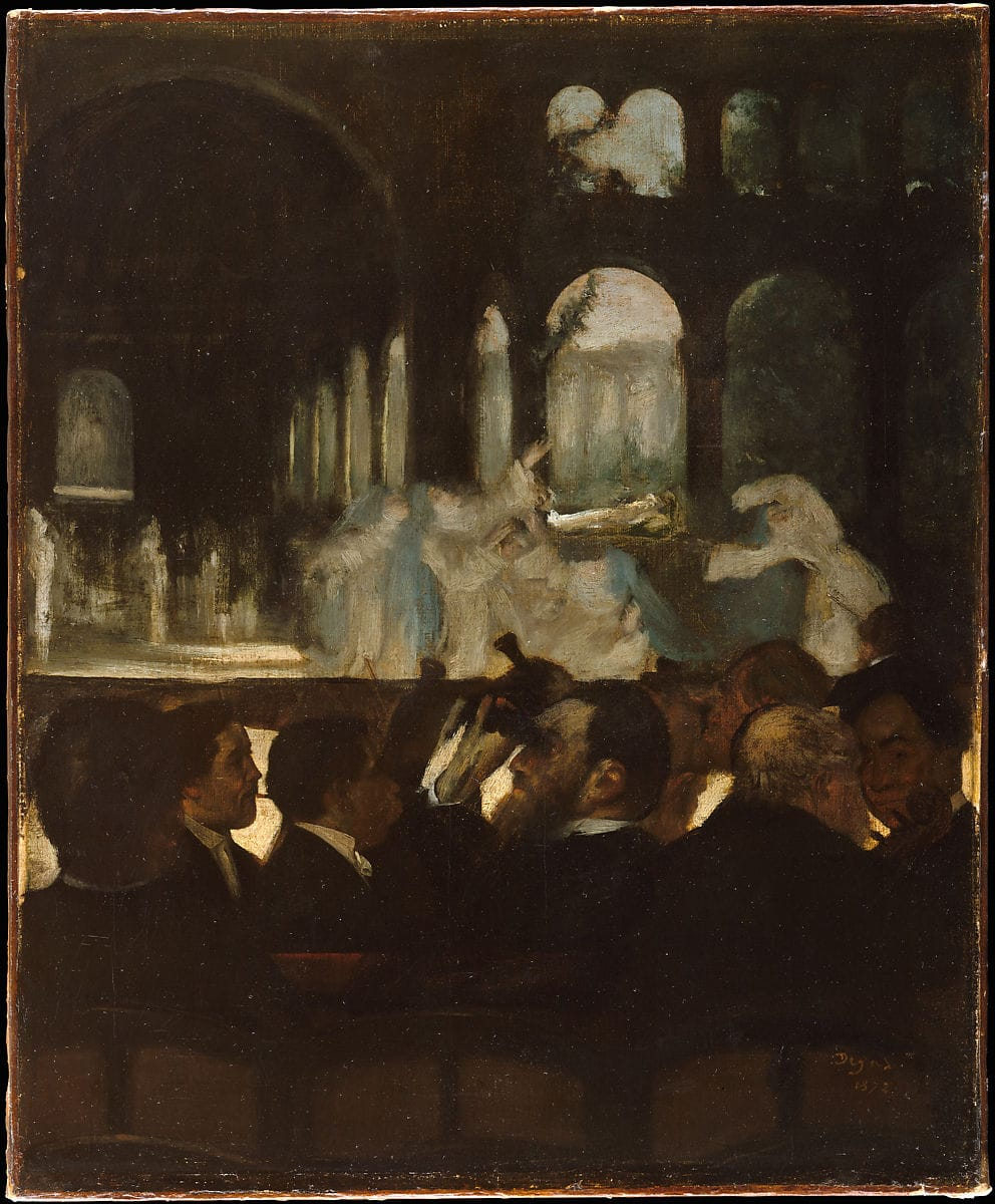 Il Balletto di Robert le Diable 1871, Degas, MET, eseguito su commissione dell'amic e banchiere Albert Hehct. Quest'utimo è rappresentato al centro dell'opera tra il pubblico con in mano un binocolo.